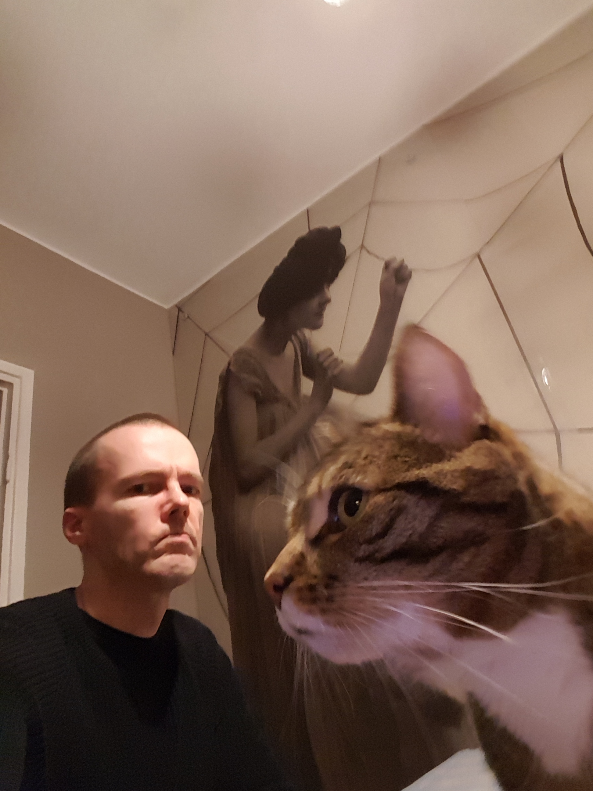 Jaakko Yli-Juonikas Turussa joulukuussa 2017